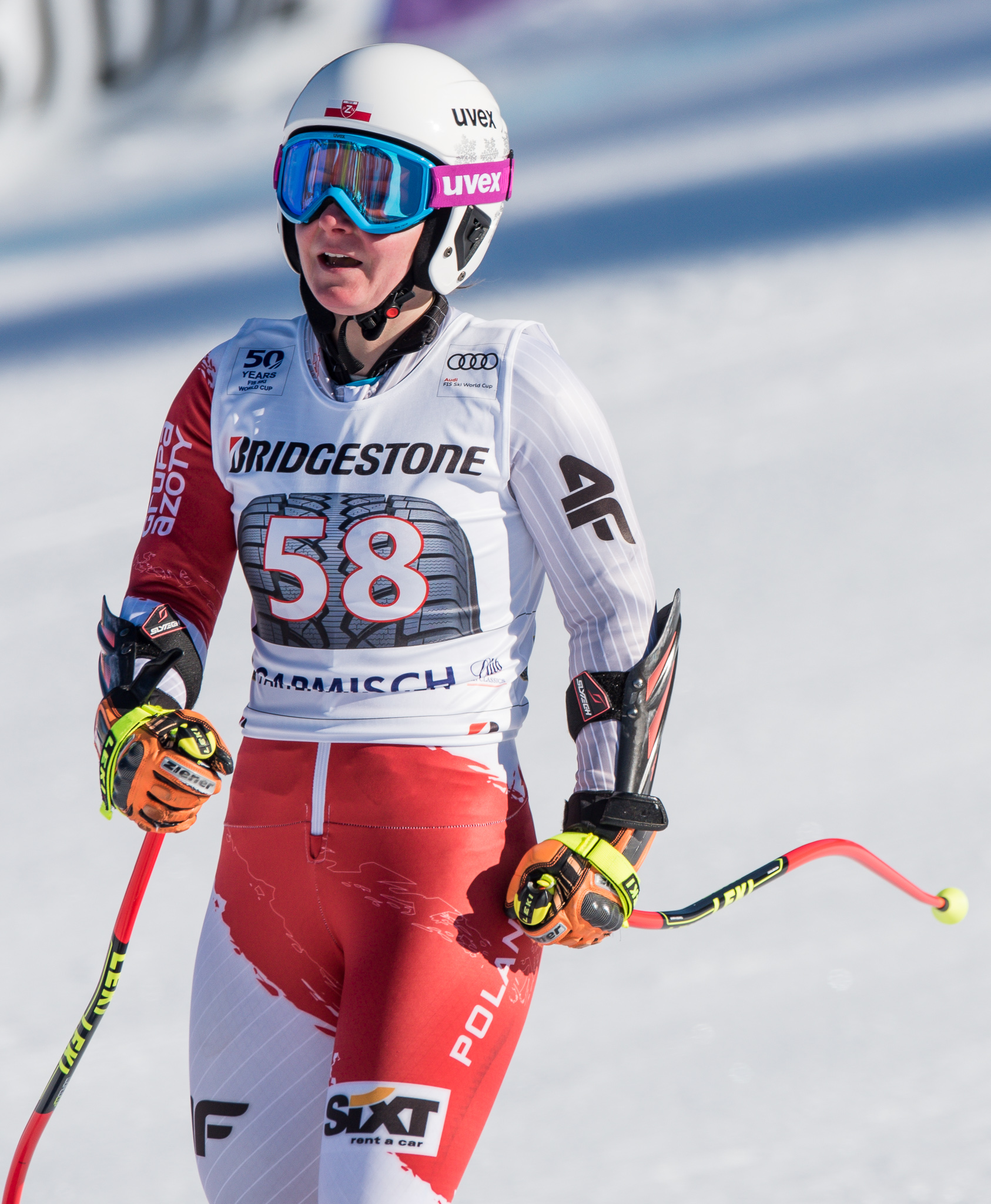 64. Kandahar Rennen,Audi FIS Ski Weltcup Garmisch-Partenkirchen,Damen Super-G,Kandahar,Ladies Super-G,Maryna Gasienica-Daniel